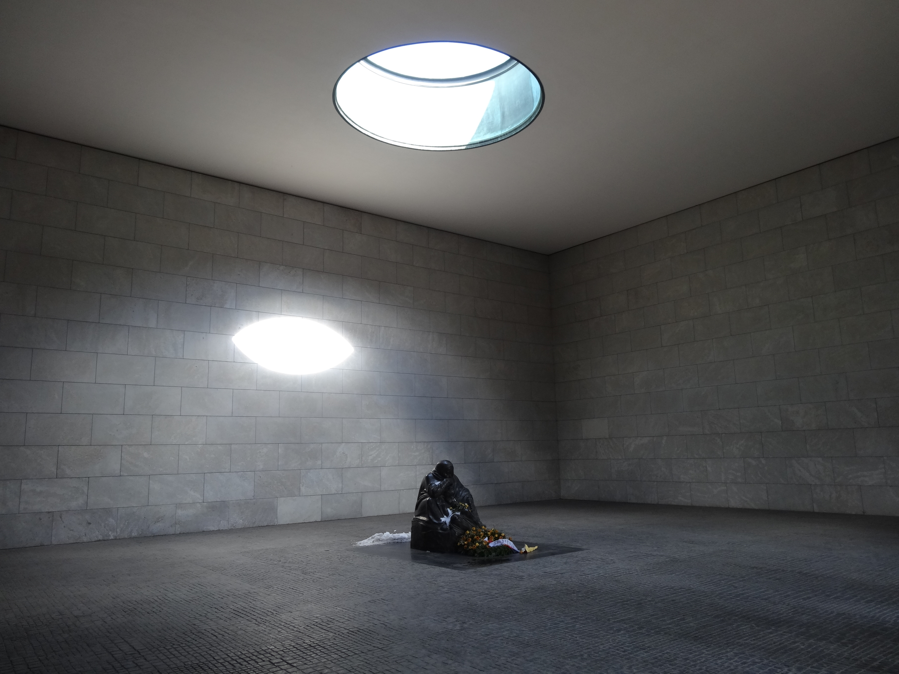 Neue Wache, Berlin (march 2013)